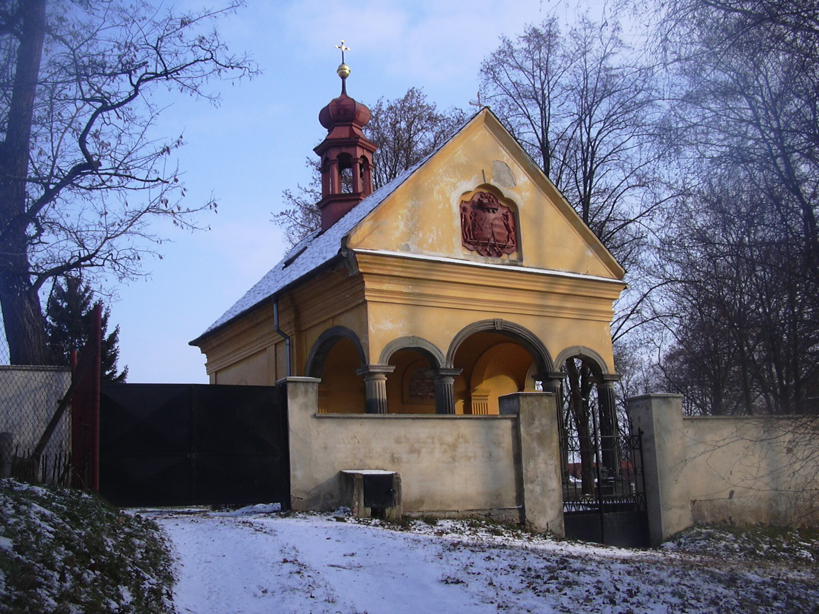 Hřbitovní kaple svatého Josefa, Ivanovice na Hané, Česká republika.